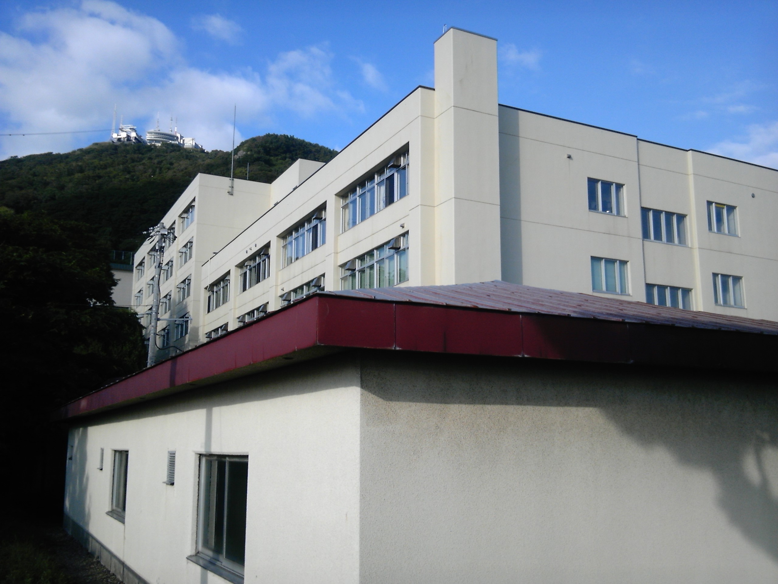 中文（台灣）: 北海道函館西高級中學側拍圖，由日本維基使用者User:Weststudent於2010年上傳至日文維基百科，以CC BY 3.0授權。